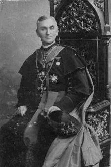 Antonín Klug (1835 - 1907), Český římskokatolický kněz a teolog.